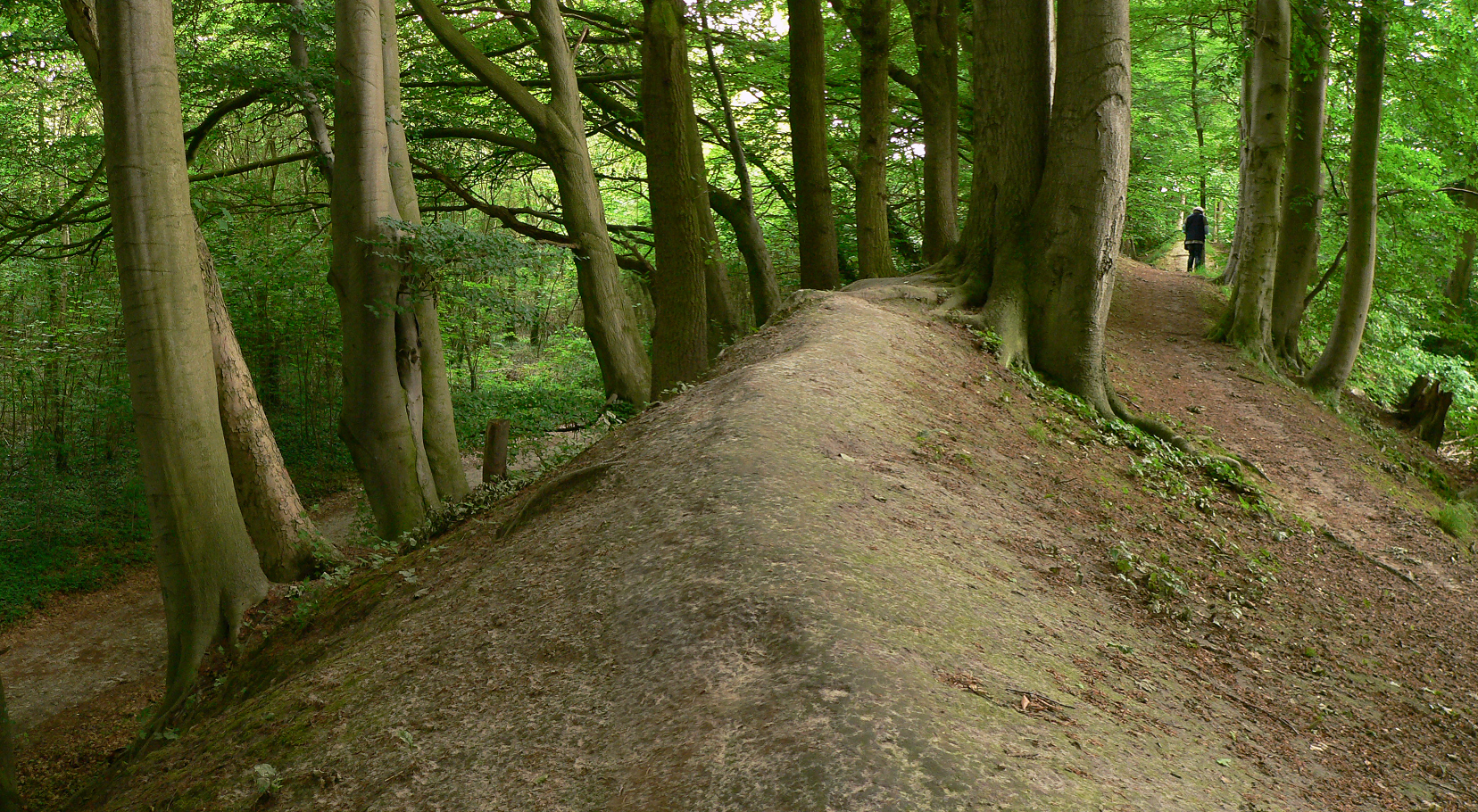 Kloster Heiligenberg, Ringwall